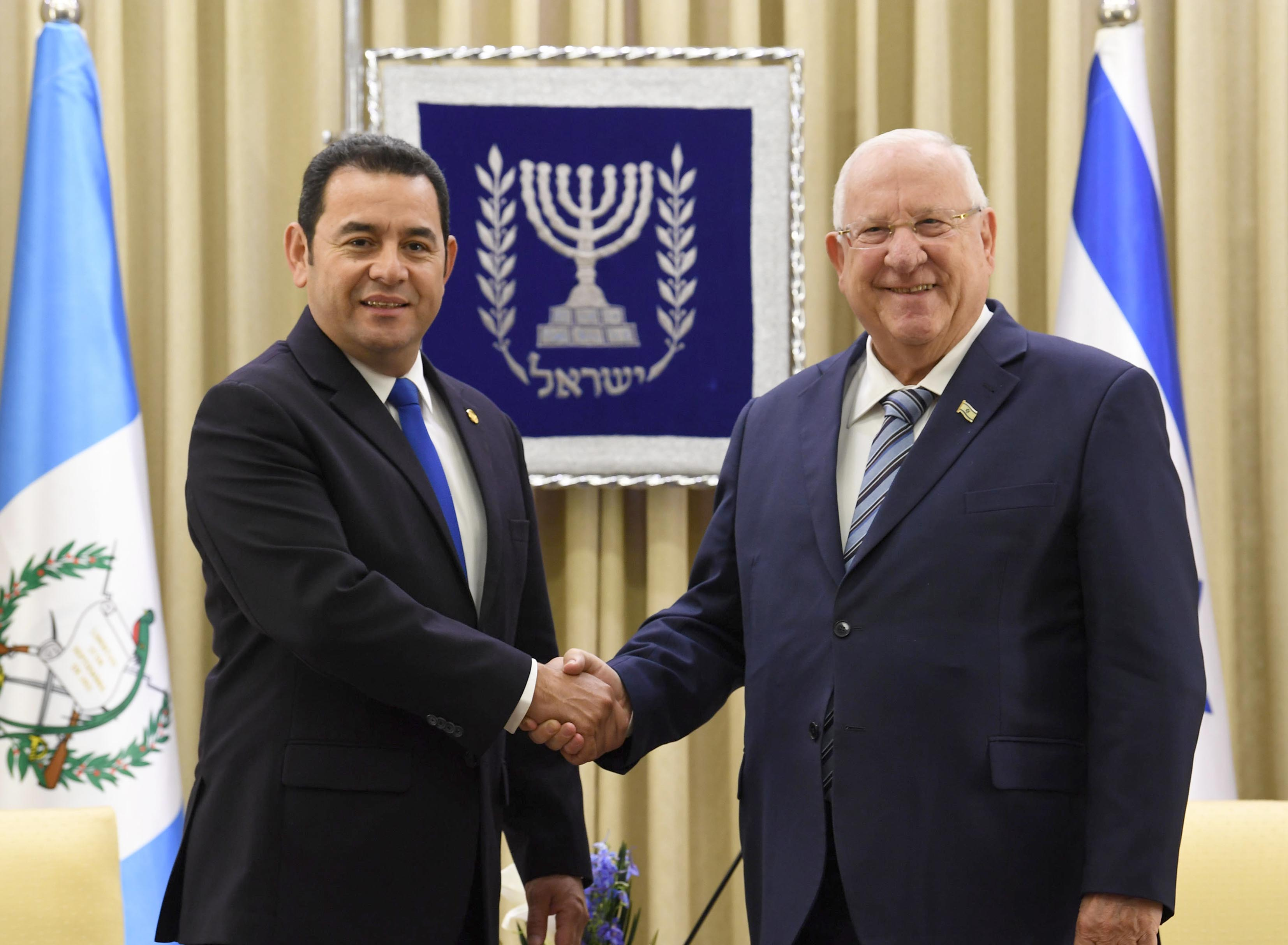 ראובן ריבלין נשיא מדינת ישראלבפגישה עם ג'ימי מורלס נשיא גואטמלה מיד לאחר טקס העברת השגרירות לירושלים.